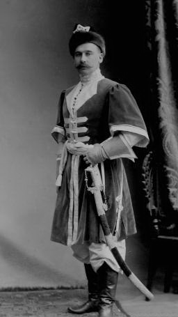 Гвардии ротмистр Кавалергардского полка А.П.Половцов в наряде стрельца Стремянного приказа времен царя Алексея Михайловича.